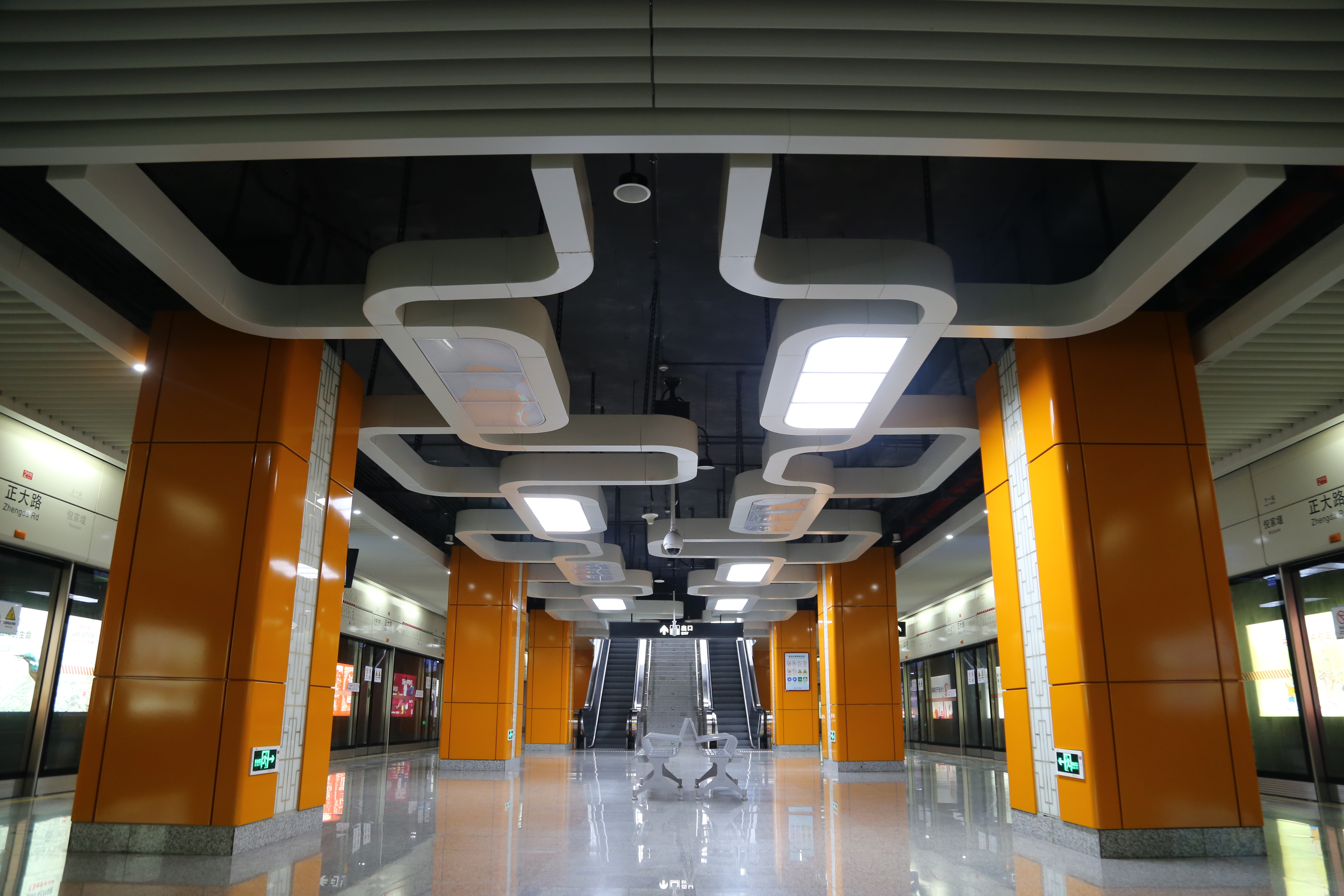 正大路站天花板